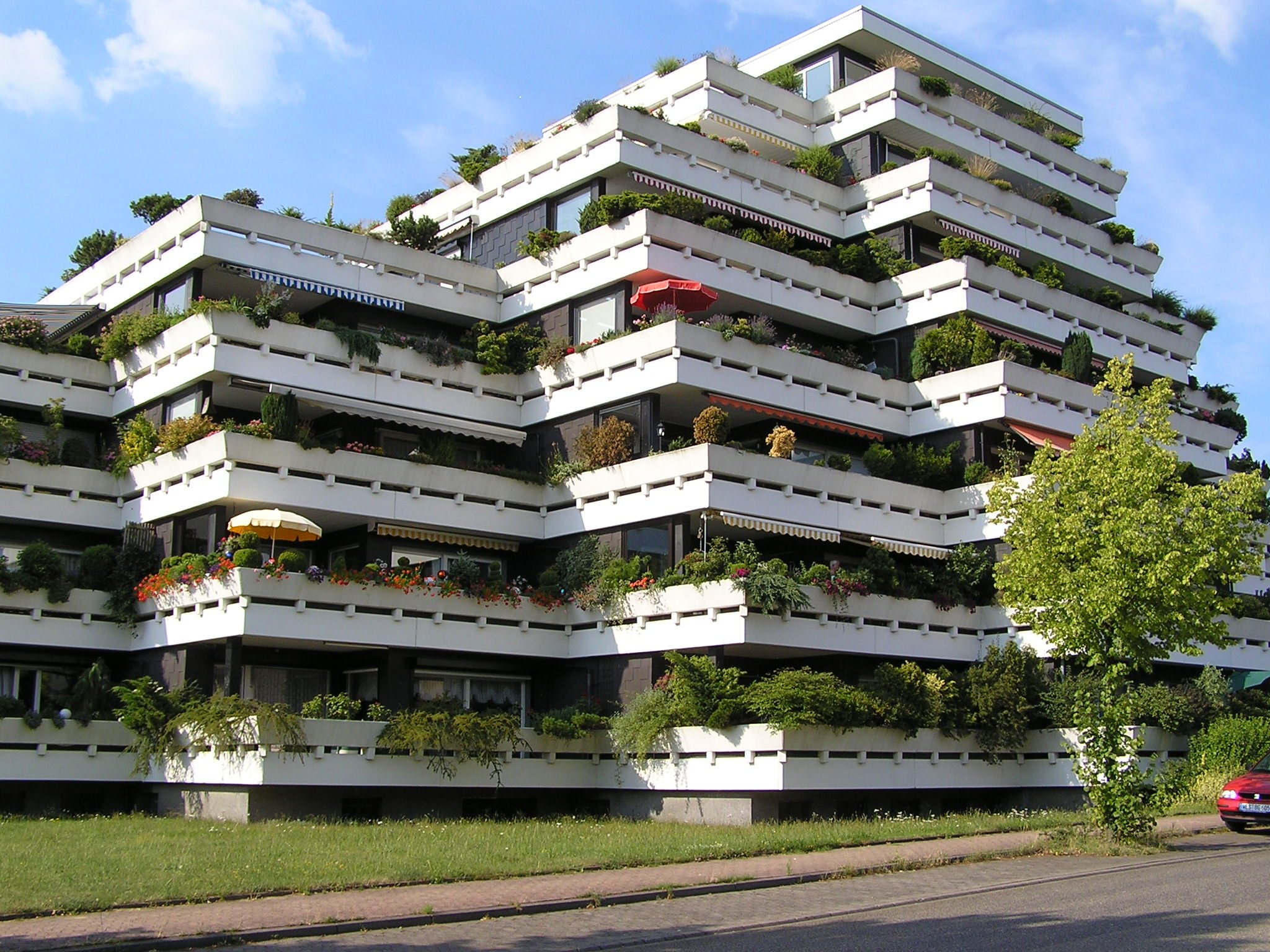 Terrace house (Terrassenhaus) in Schermbeck, Germany